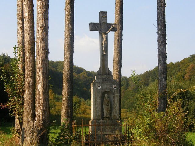 Kereszt Felsőszölnökről (Vas megye)